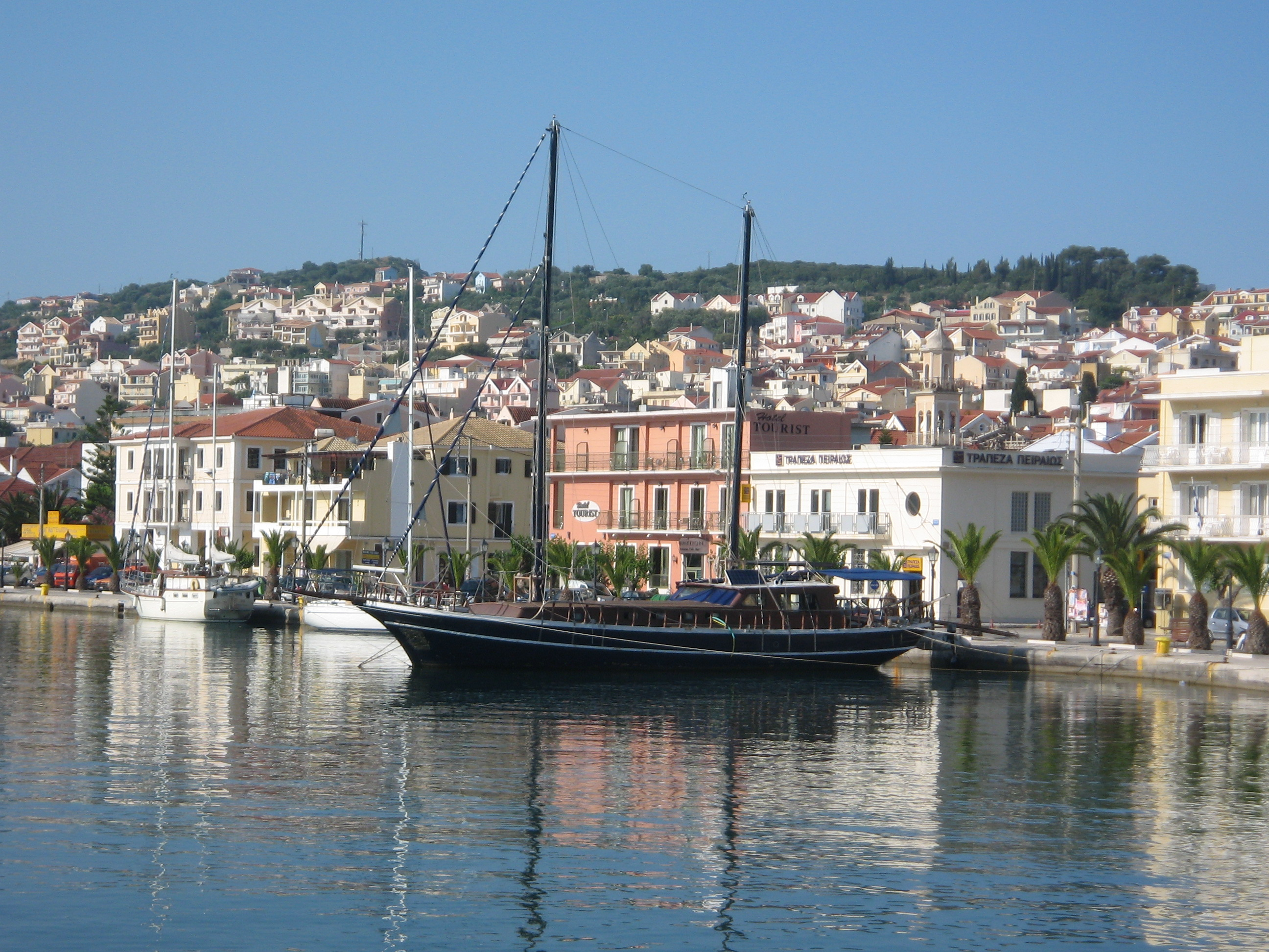 Kefalonia's capital